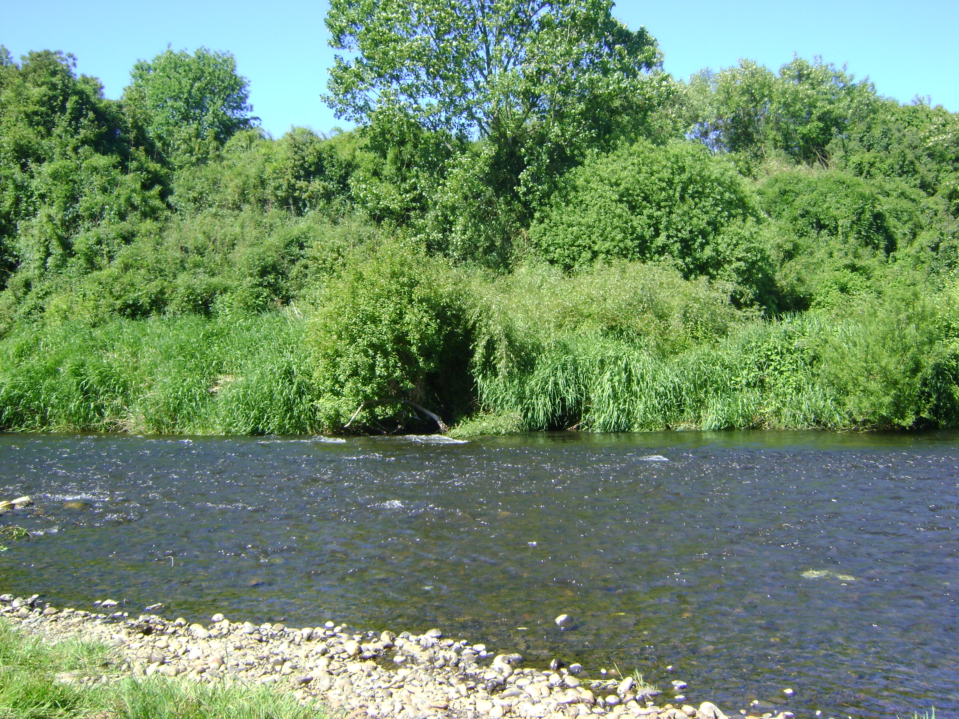 Rio Damas desde sector Chuyaca